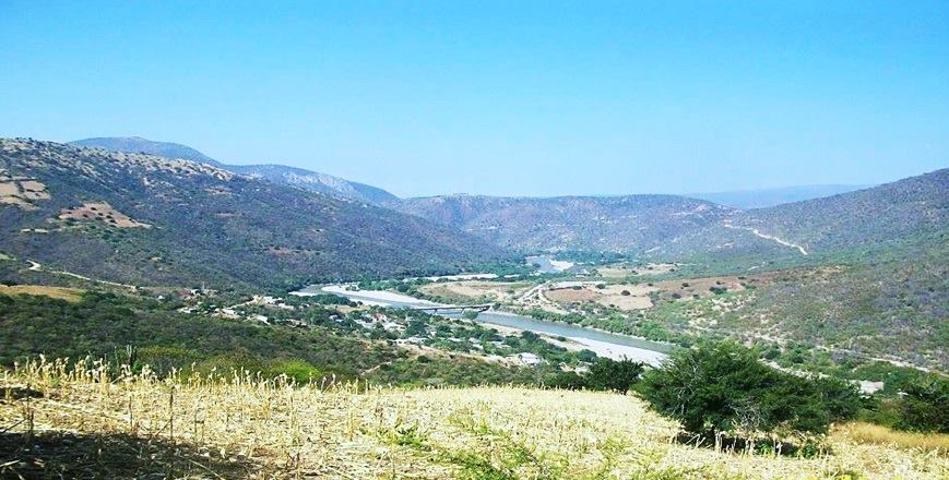 Panorama de Papalutla en el otoño